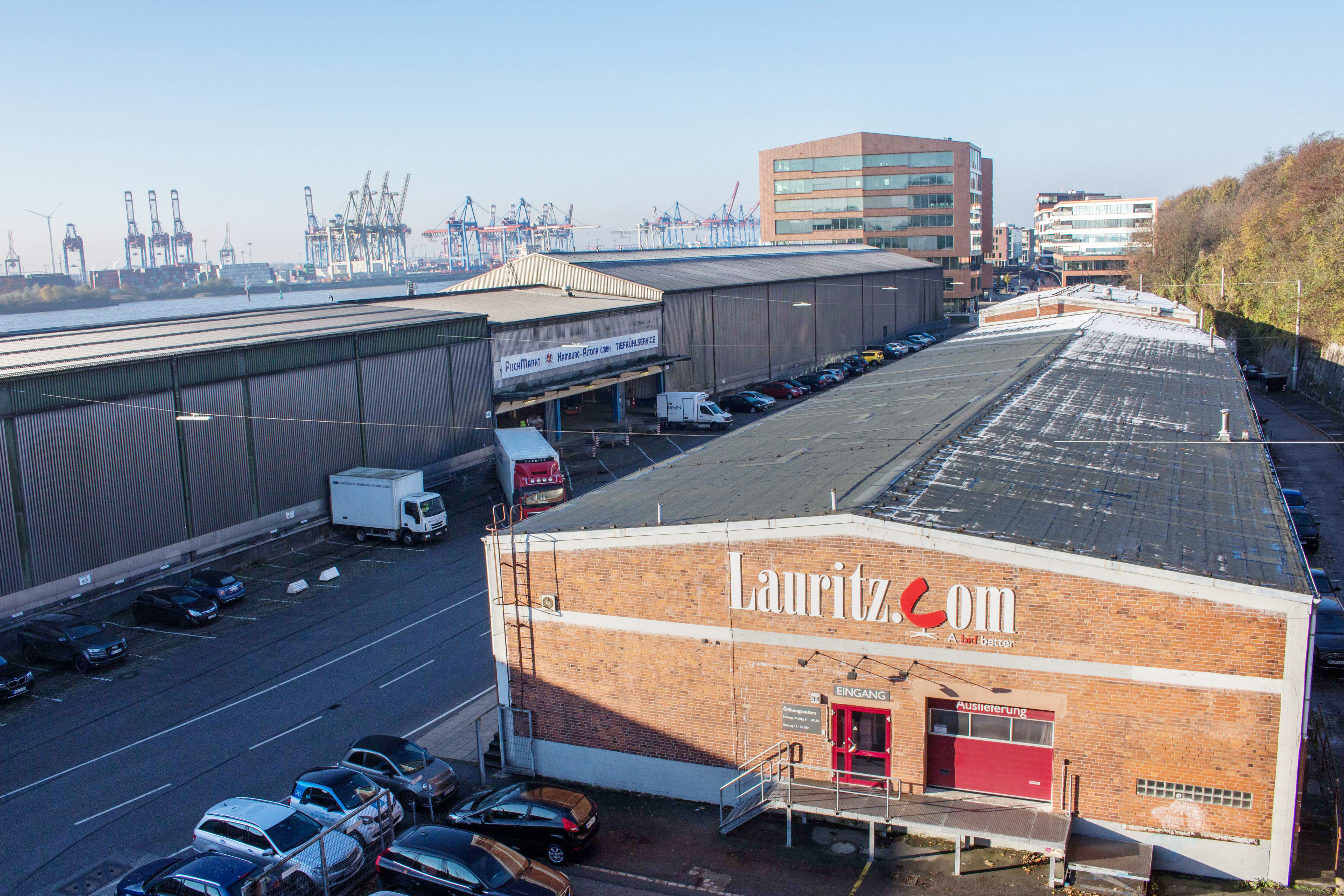 Filiale in Hamburg in der großen Elbstraße